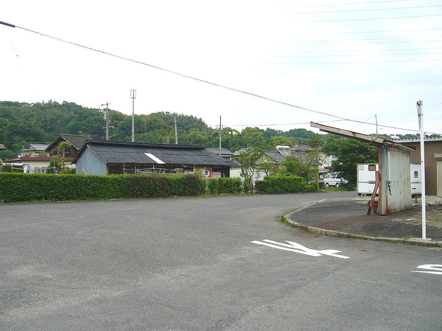 近鉄八王子線 伊勢八王子駅跡 三重交通バスの方転場として用いられていたが、現在は使用されていない